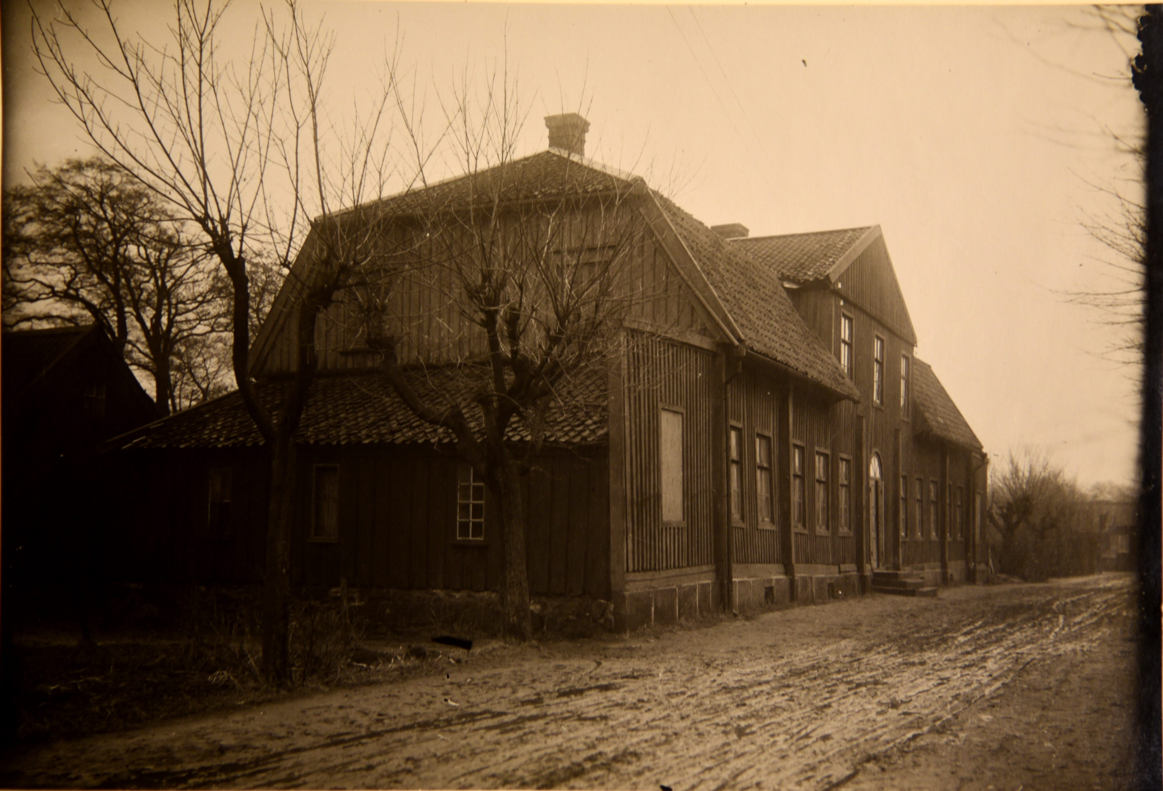 Norra Burgården i stadsdelen Heden i Göteborg år 1920.